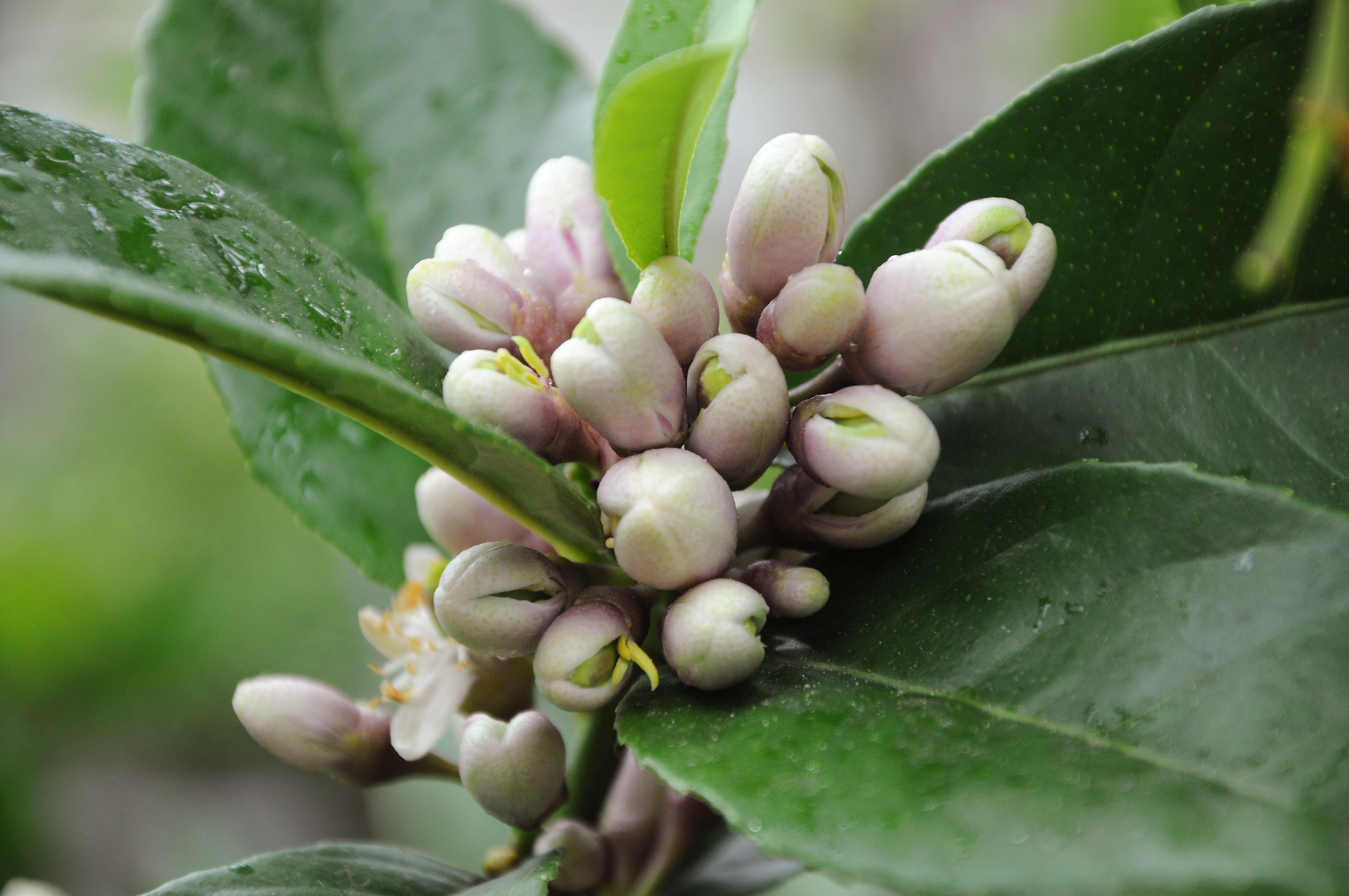 Citrus medica